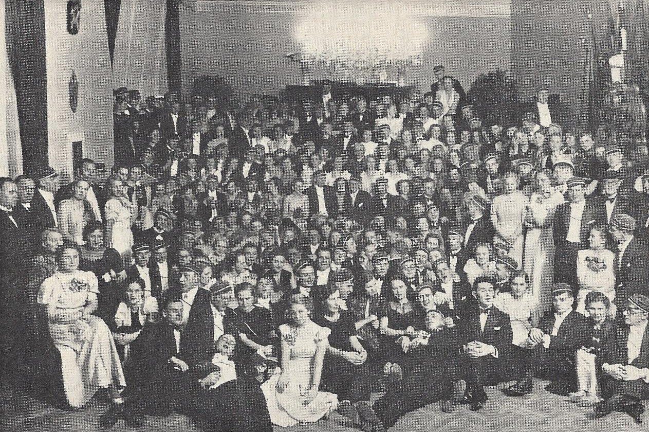 Familienabend im C!Q! der Vironia in Dorpat